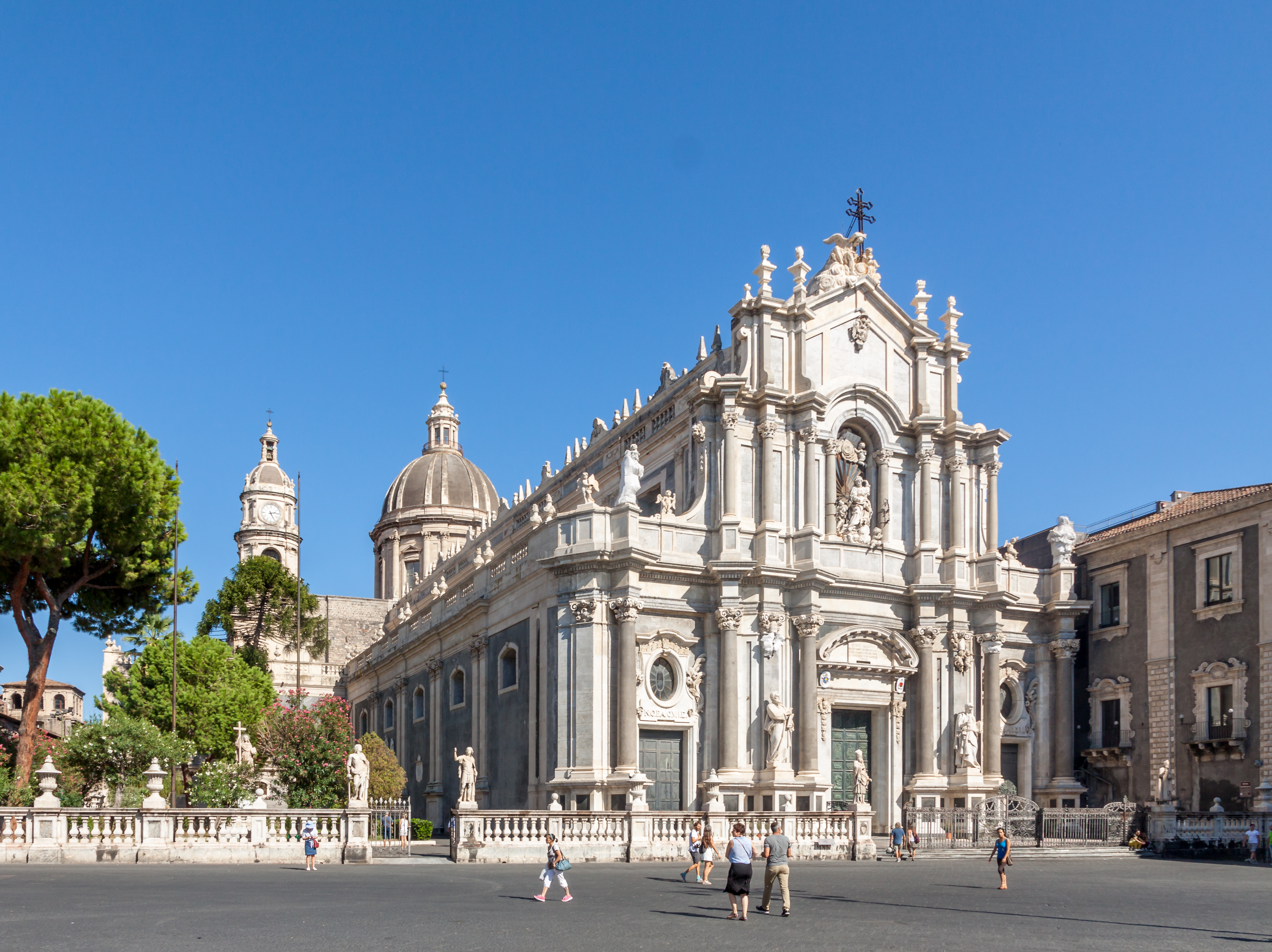 Cathedral (Catania) - exterior